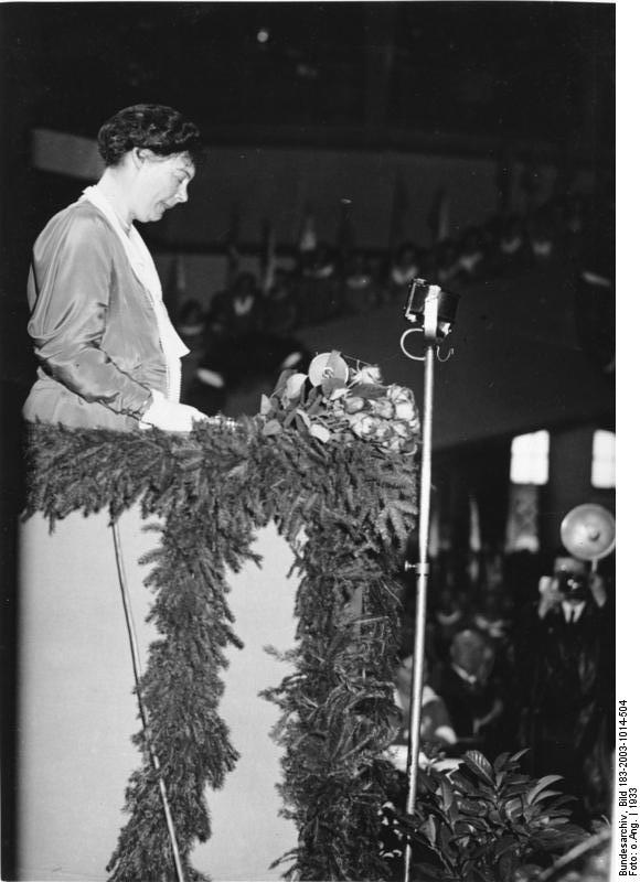 Berlin, Luisenfeier im Sportpalast Scherl: [Berlin 1933], Luisenfeier im Sportpalast Kronprinzessin Cecilie, Schirmherrin des Bundes Königin Luise, bei ihrer Ansprache. 16125-33 Abgebildete Personen: Preußen, Cecilie von: 1886-1954, verheiratet mit Kronprinz Wilhelm, Tochter Großherzog Friedrich Franz III. von Mecklenburg-Schwerin, Deutschland